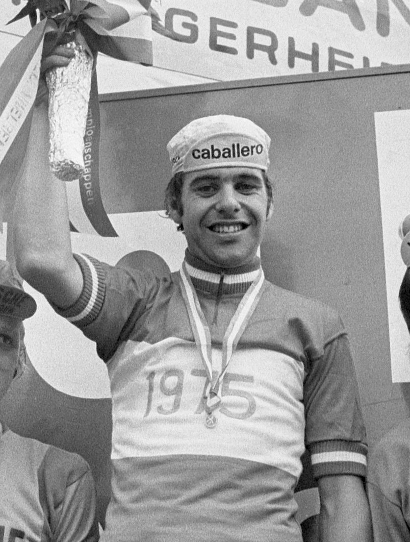 Nationale wegkampioenschappen wielrennen voor amateurs in Hoogerheide. Huldiging van Tabak, Tak en Damen (vlnr)